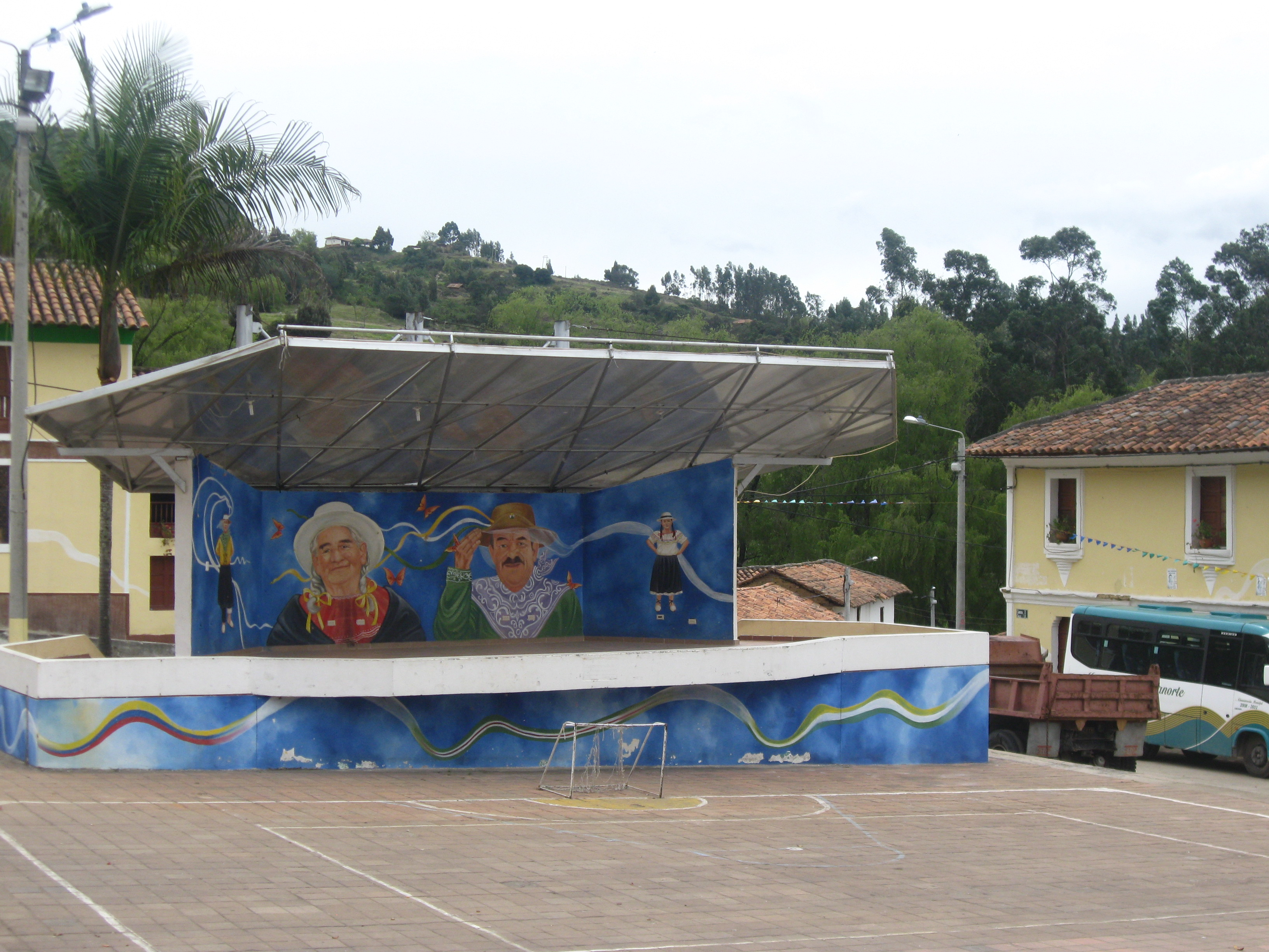 Calle de Sativanorte, Boyaca, Colombia. Muestra de la arquitectura de este pueblo.